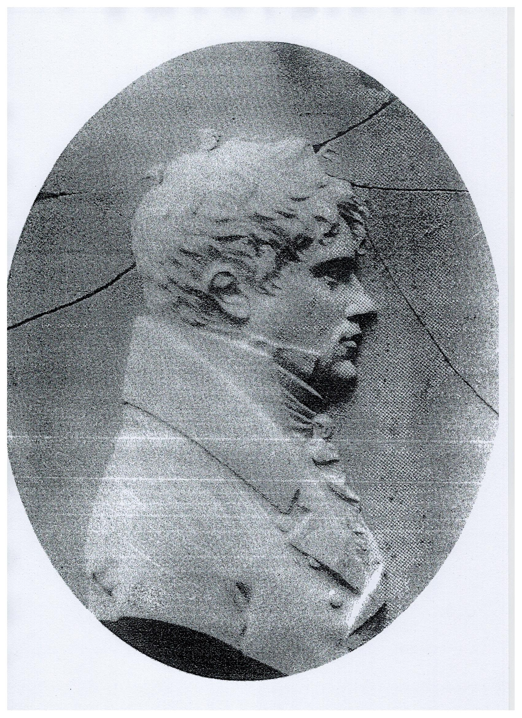 Friedrich Wilhelm Bessel (1784-1846) Gipsplakette von Leonhard Posch